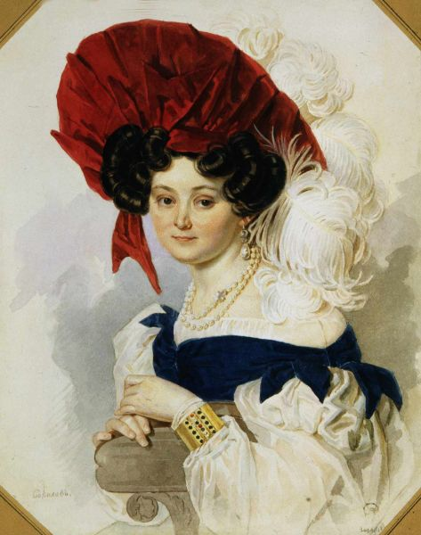 Орлова-Чесменская Анна Алексеевна (1785-1848)